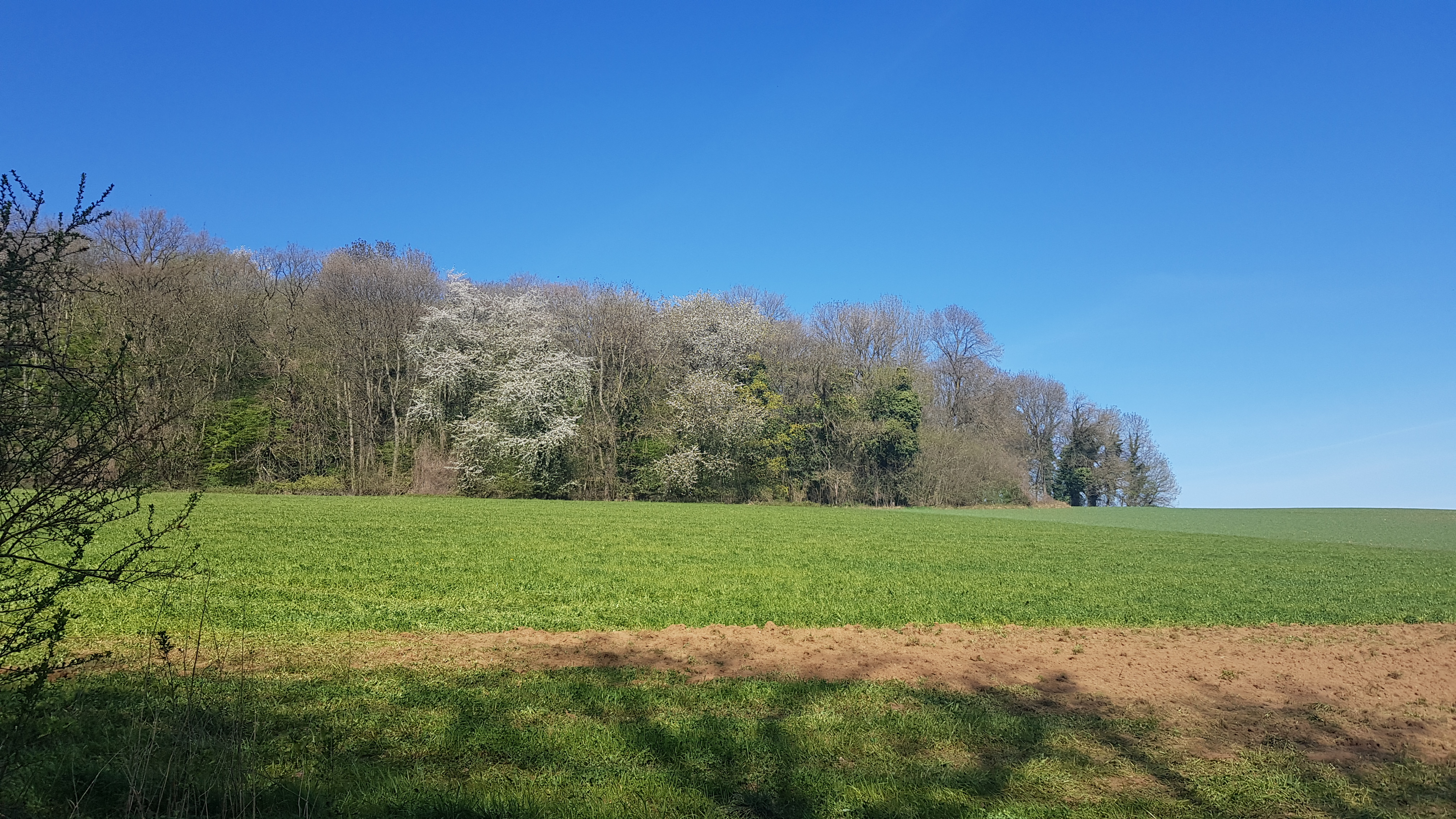 Groeve Gerendal, Oud-Valkenburg, Nederland